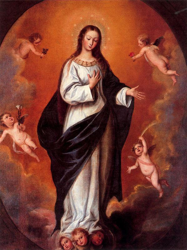 La obra representa la Inmaculada Concepción de la Virgen María, madre de Jesucristo.